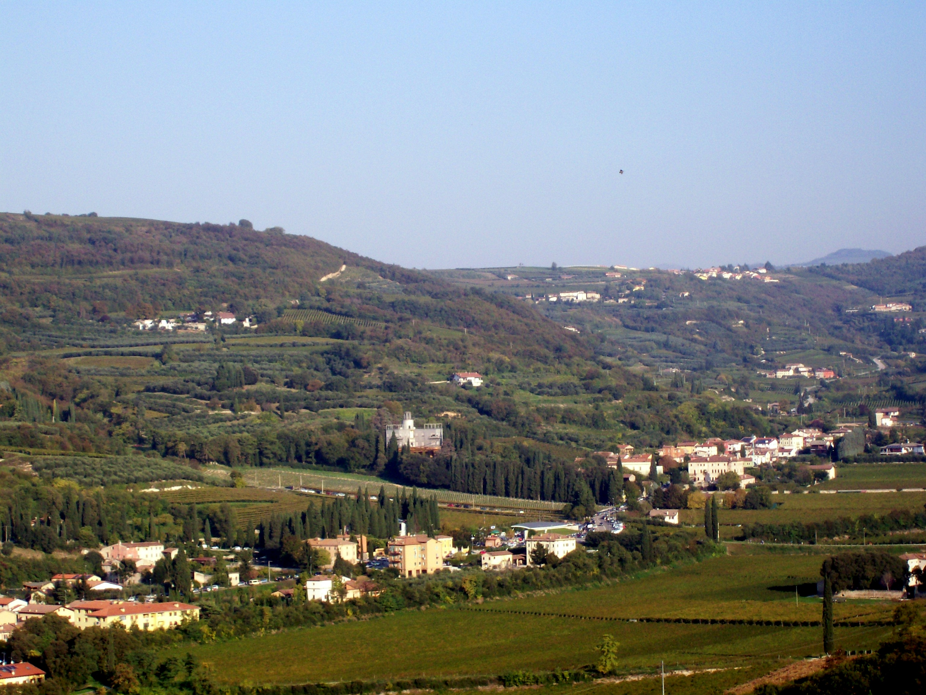 Panorama di parte dell'abitato di Marcellise con quasi al centro la Villa Girasole. In alto a destra si vede Pian di Castagnè.